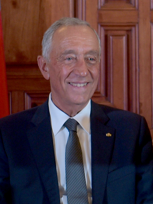 Es un honor dar la bienvenida a México al Presidente de la República Portuguesa, Marcelo Rebelo de Sousa. Su valiosa presencia da un renovado impulso al diálogo entre nuestros países.